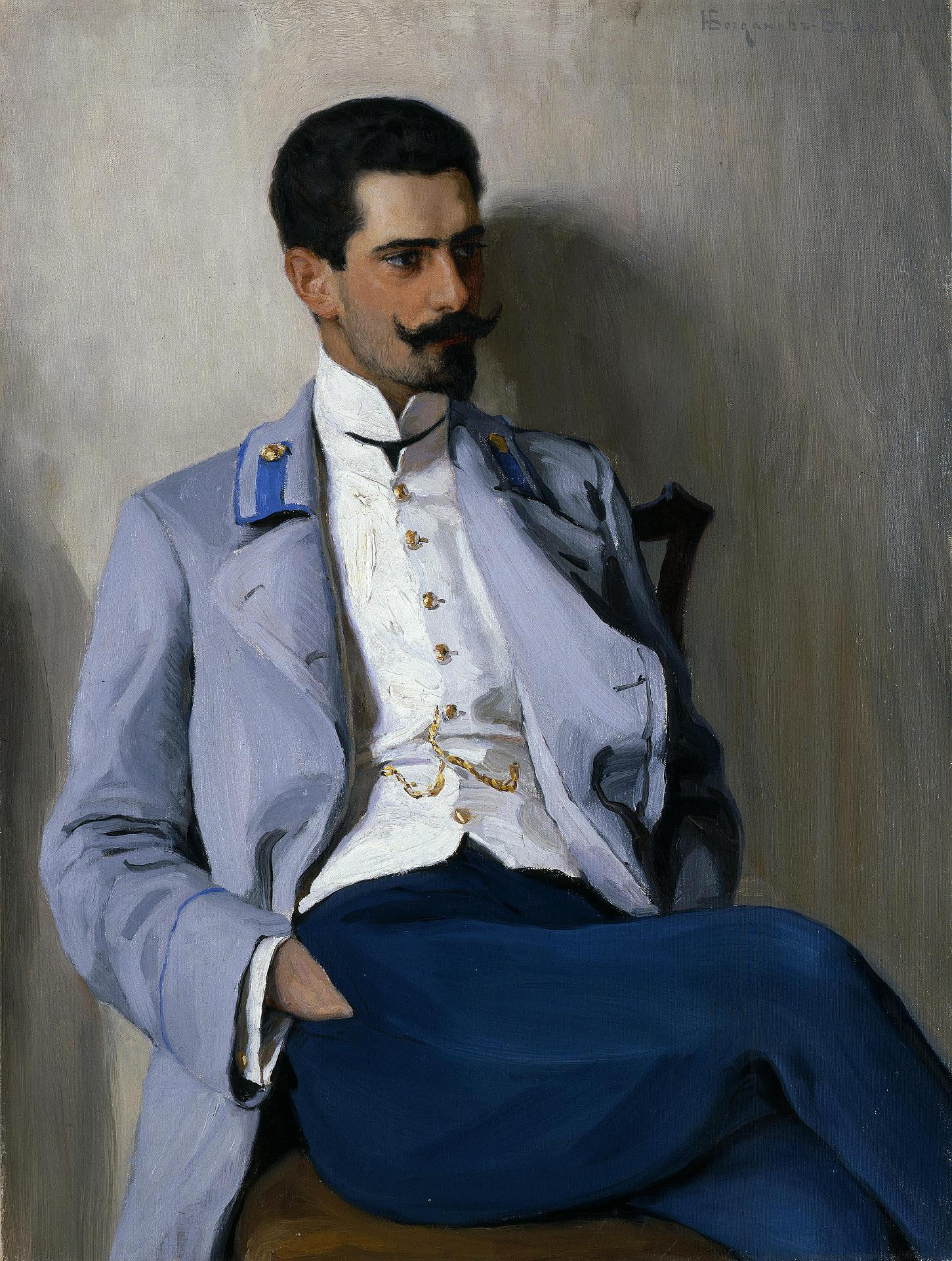 Князь Александр Константинович Горчаков (1875-1916)